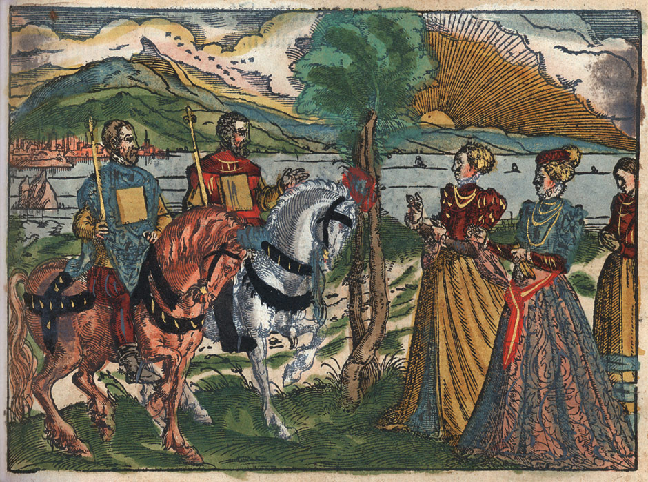 Colorized woodcut from: (Rüxner, Georg). Thurnierbuch, das ist, Warhaffte, eigentliche, vnd kurtze Beschreibung von Anfang, Vrsachen, Vrsprung, vnd Herkommen der Thurnier im Heyligen Romischen Reich Teutscher Nation, wie viel offentlicher Landthurnier von Keyser Heinrichen dem Ersten dieses Namens an biss auff Keyser Maximilian den Andern ... vnd in welchen Statten die alle gehalten, auch durch welche Fursten, Graffen, Herrn, Ritter, vnd vom Adel dieselben jeder Zeit besucht worden, Frankfurt am Main, Reffeler für Feyerabend, 1578-79